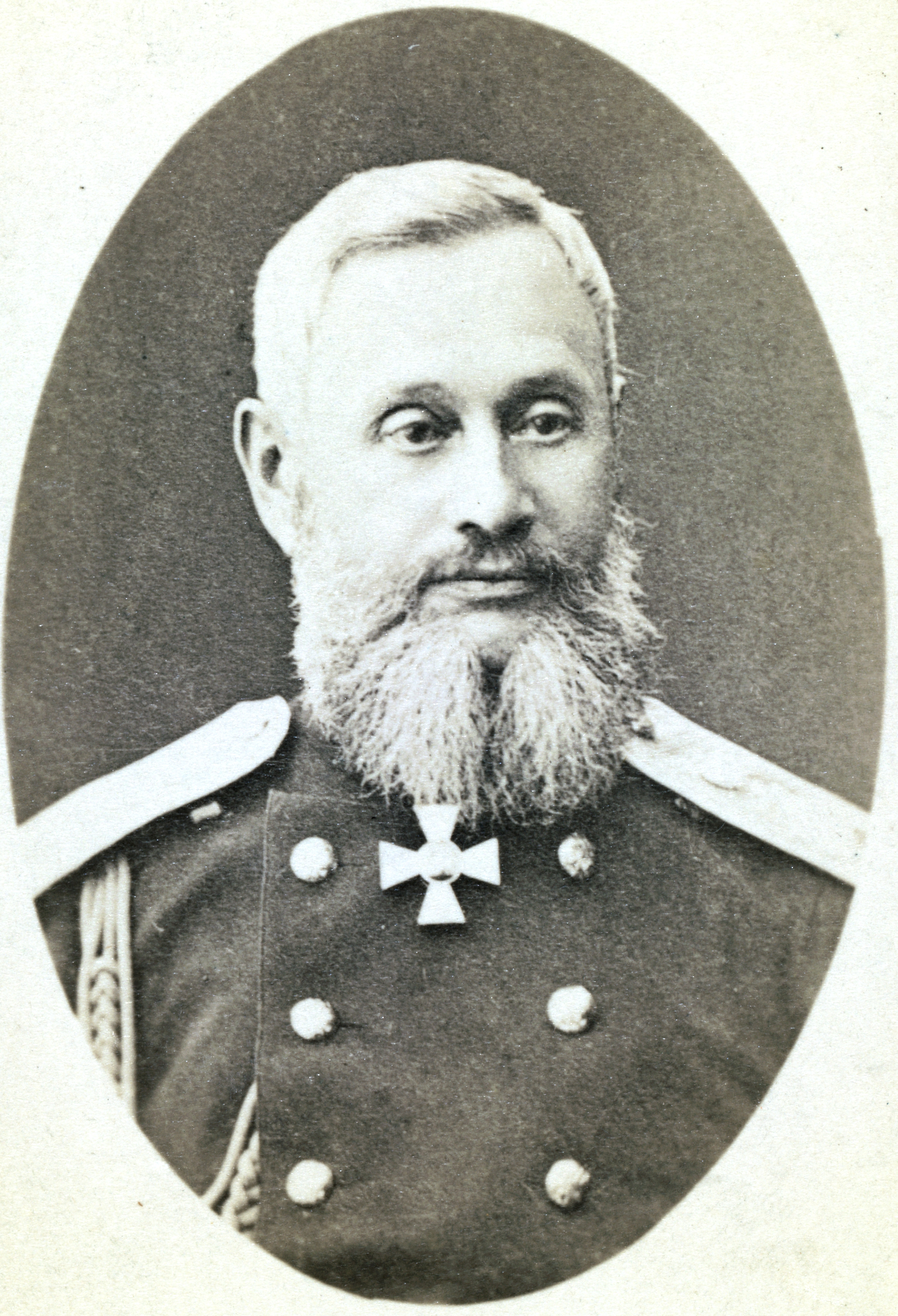 Ванновский, Пётр Семёнович